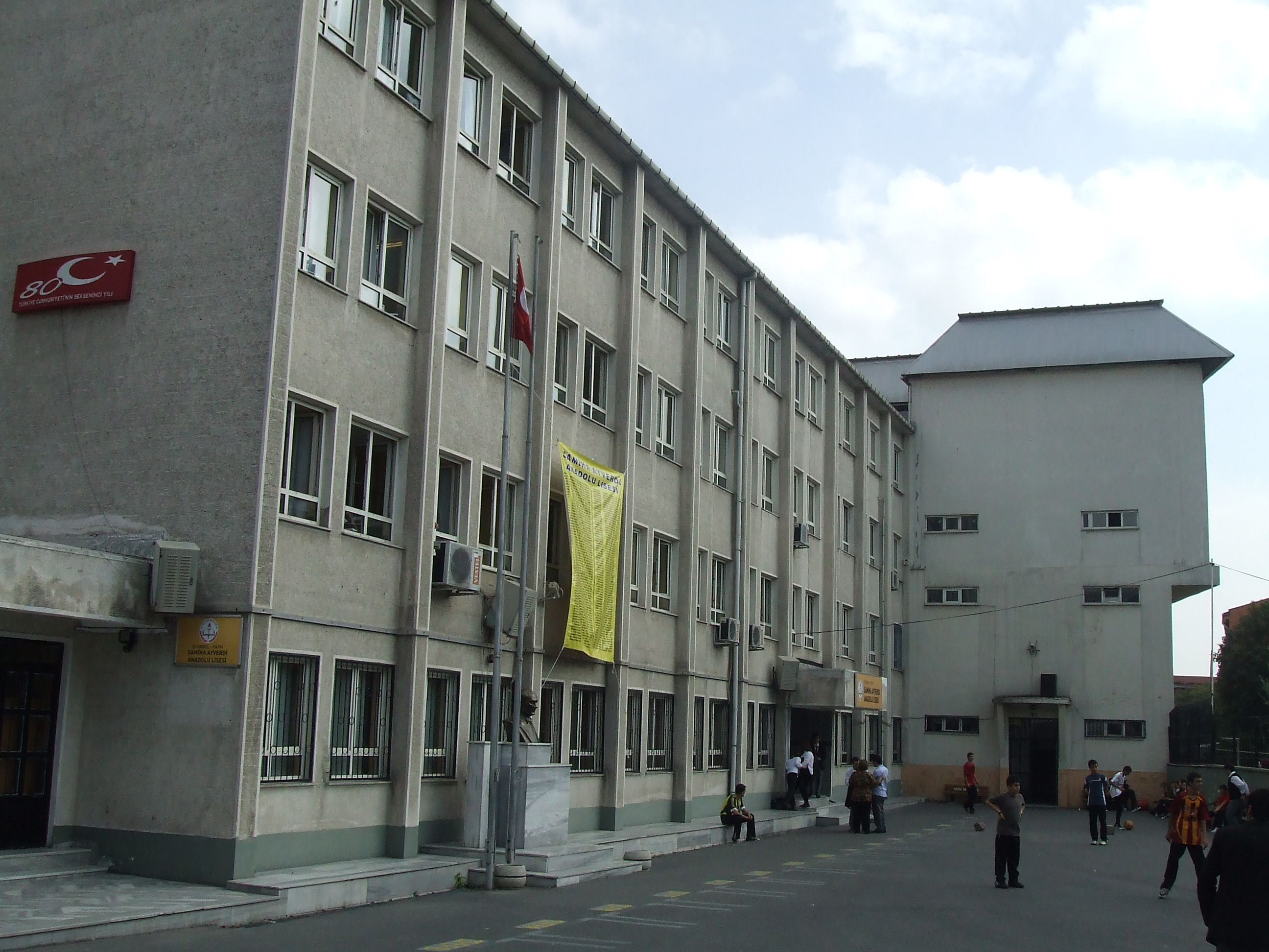 Samiha Ayverdi Anadolu Lisesi, Fatih, İstanbul, Türkiye